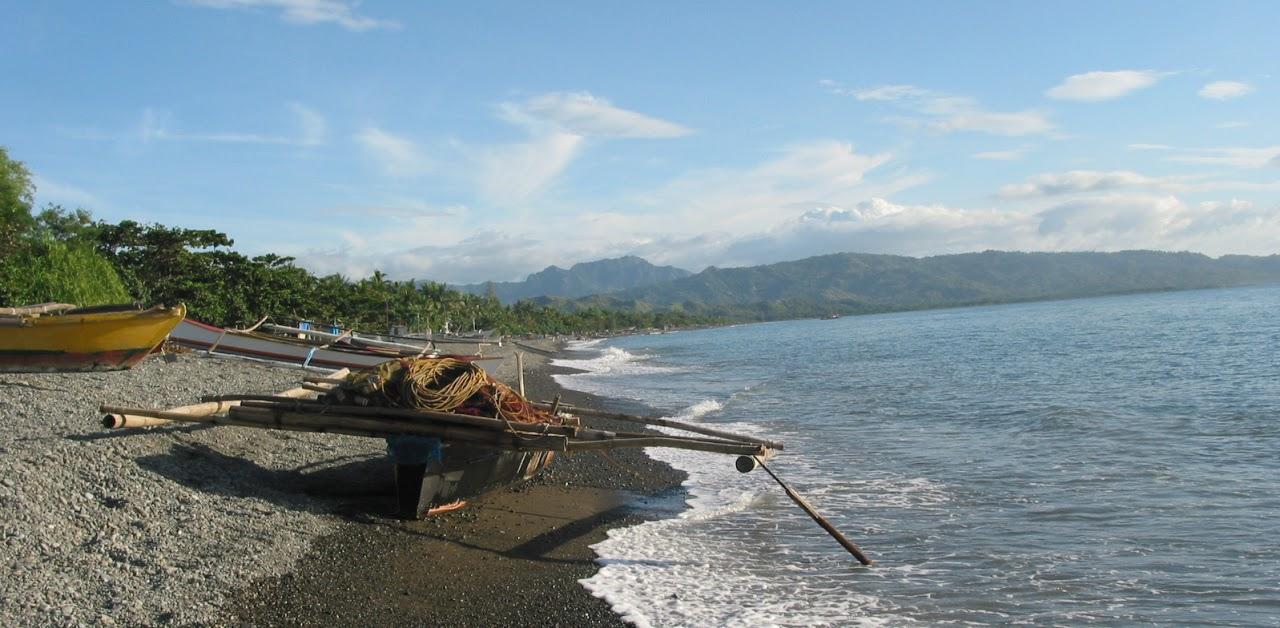 Bugasong seashore, Antique, Philippines